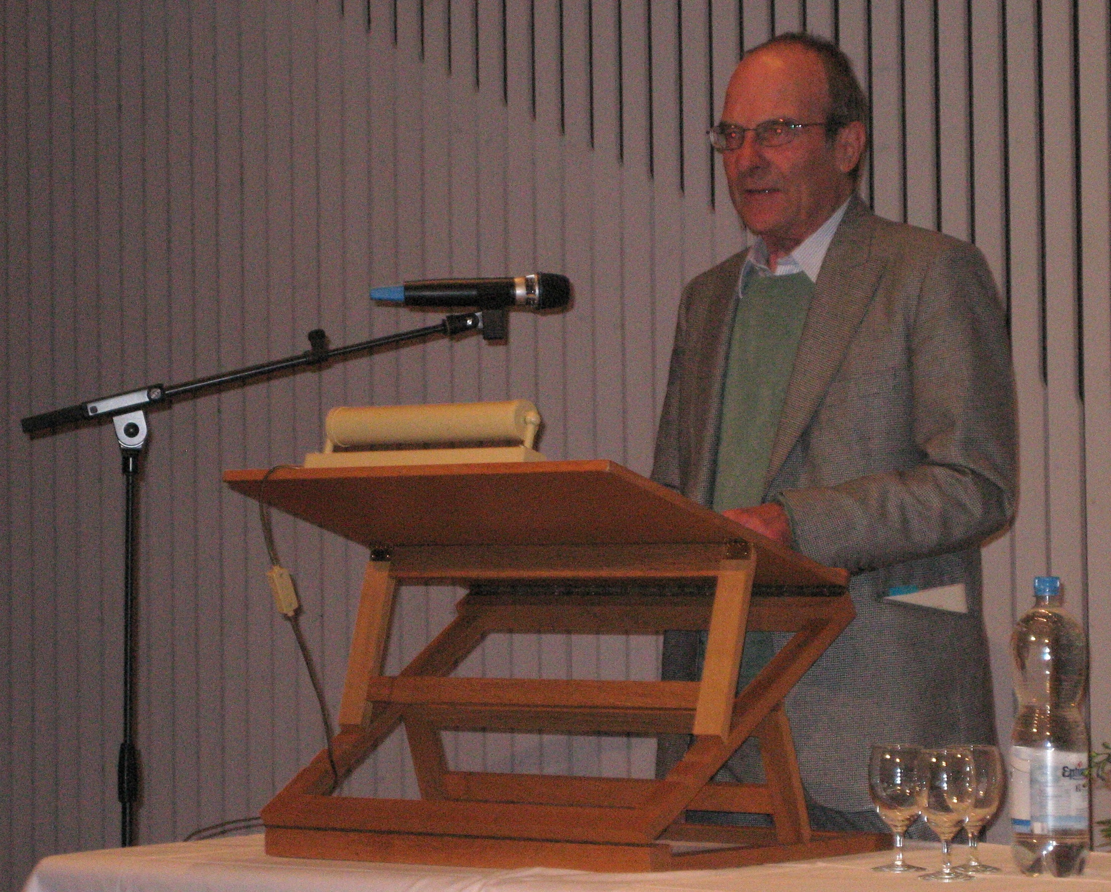 Jürg Schubiger erhält den Preis der Zolliker Hintermeister-Stiftung in Zollikon, 21. Juni 2009